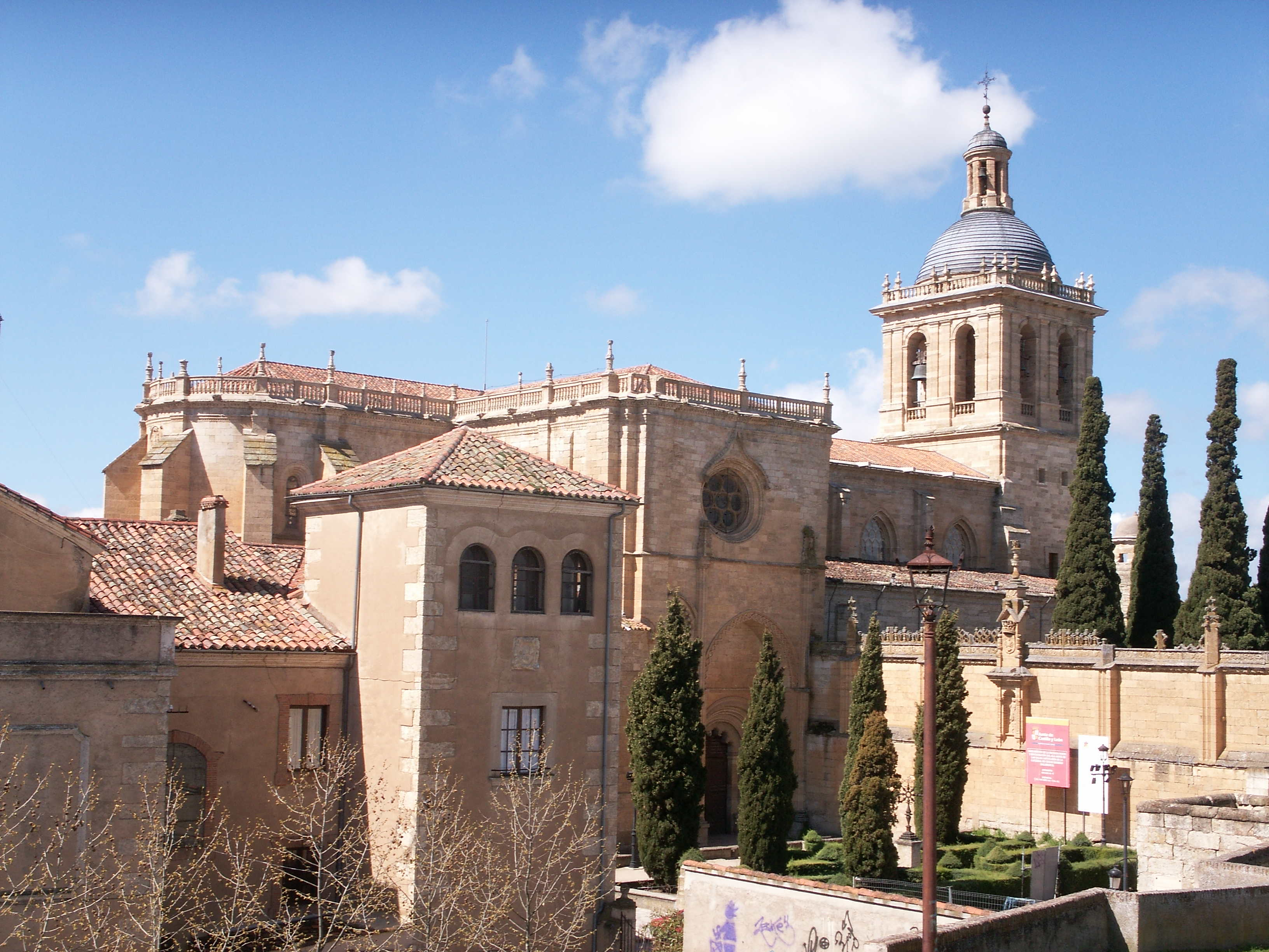 Ciudad Rodrigo Cathedral